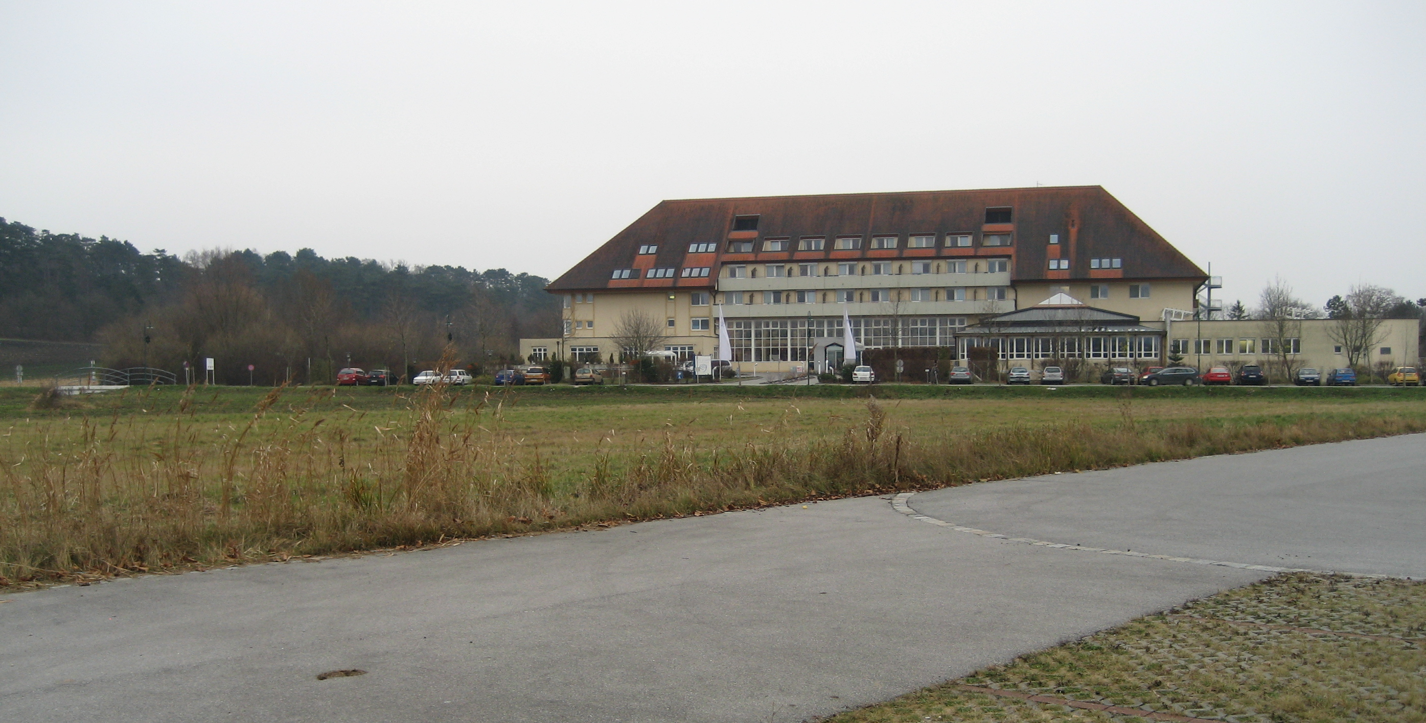 das Kurzentrum in Bad Pirawarth in Niederösterreich